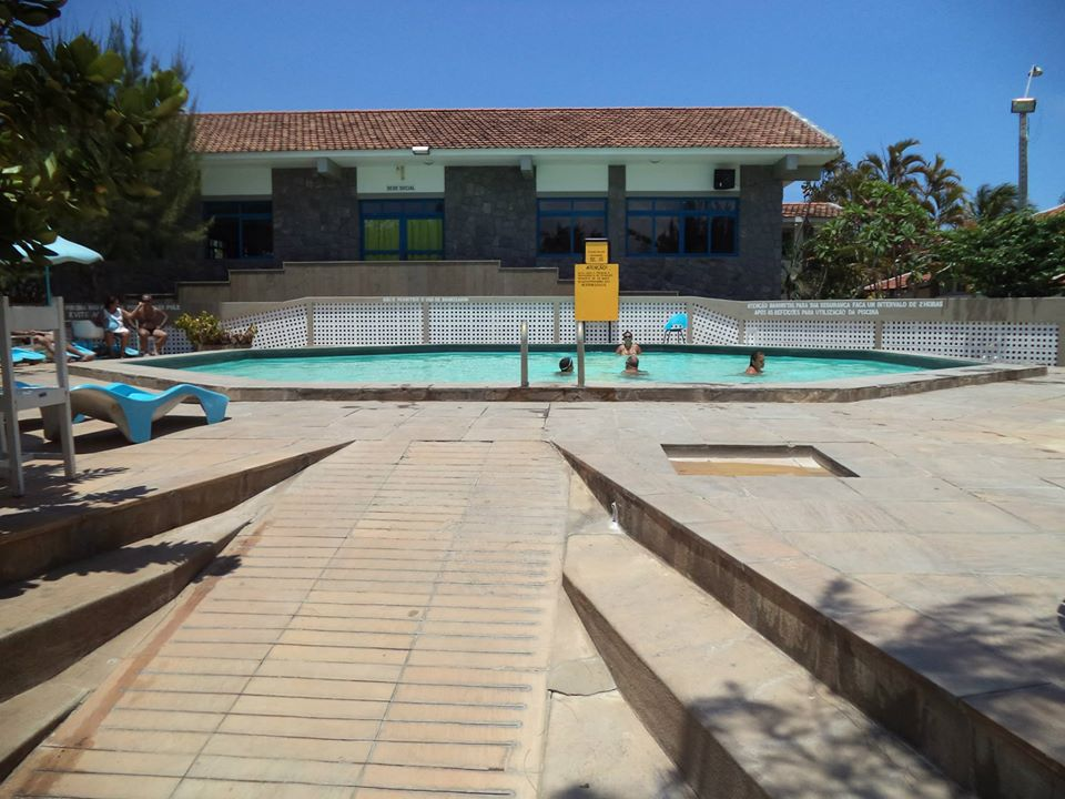 Piscina no SESC em Grussaí, São João da Barra, Brasil.